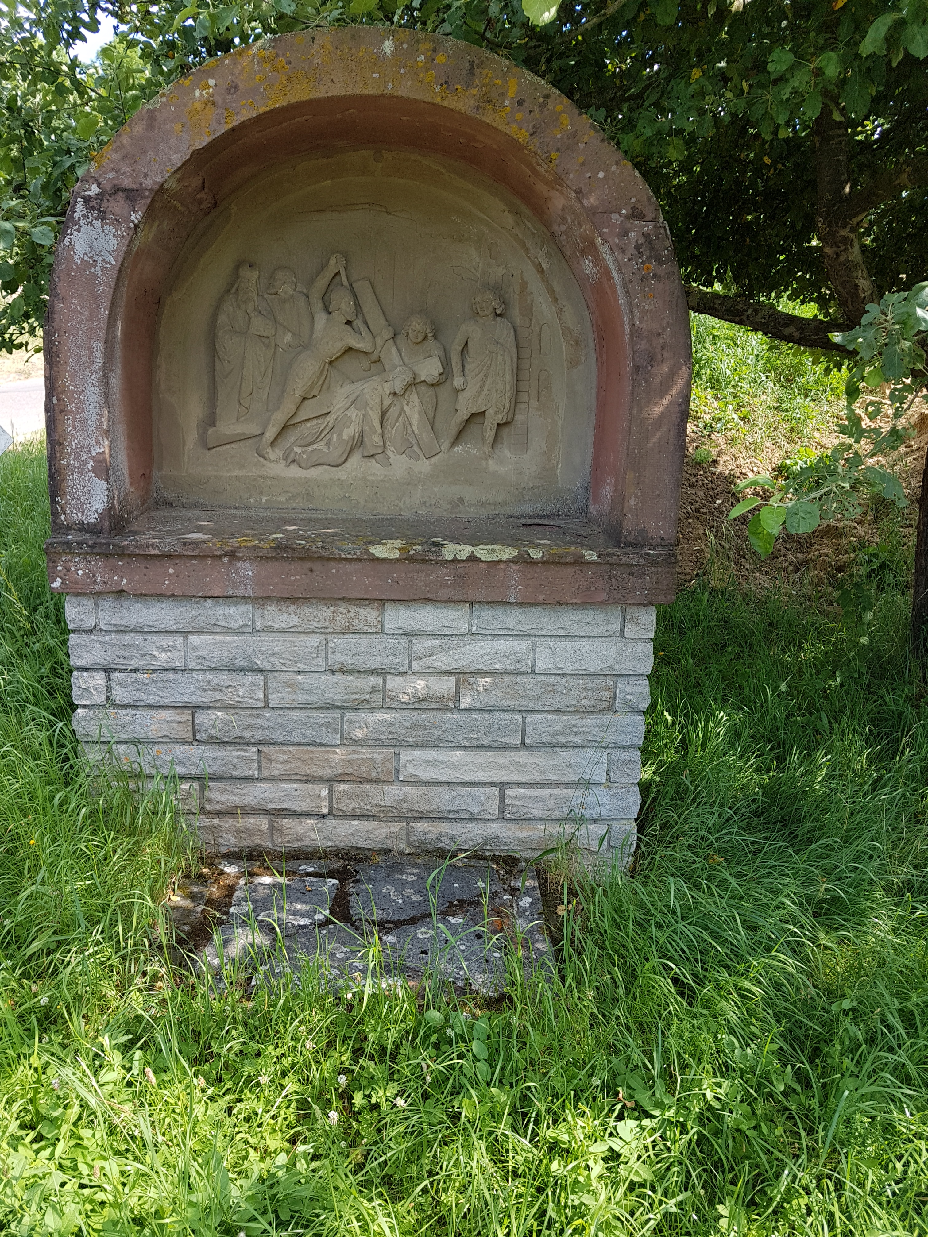 Kreuzweg zur Dittwarer Kreuzkapelle am Kreuzhölzle Bilder hochkant